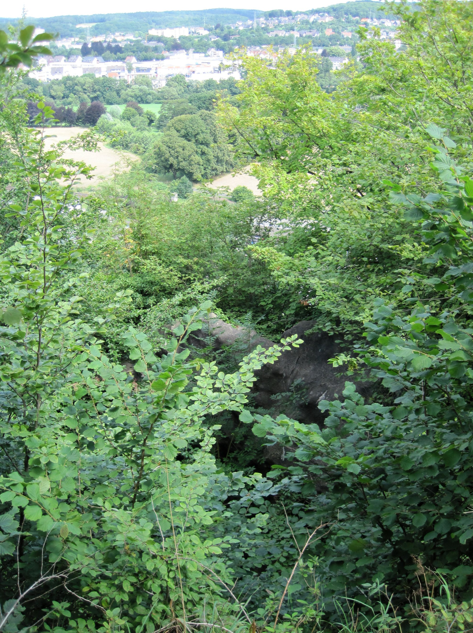 Hünenpforte, Hagen-Holthausen